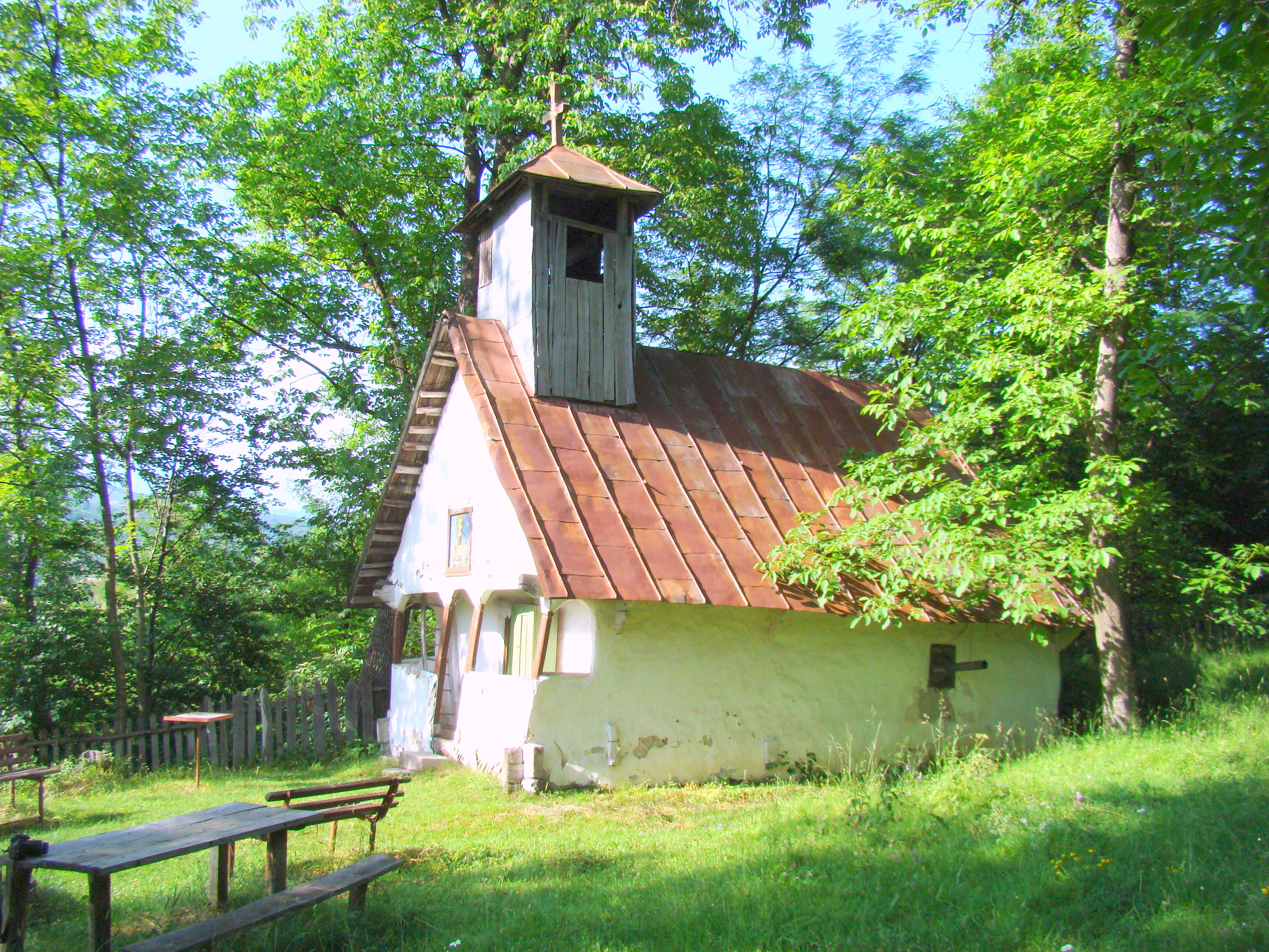 Biserica de lemn „Sfântul Nicolae” din Ponoarele, județul Mehedinți